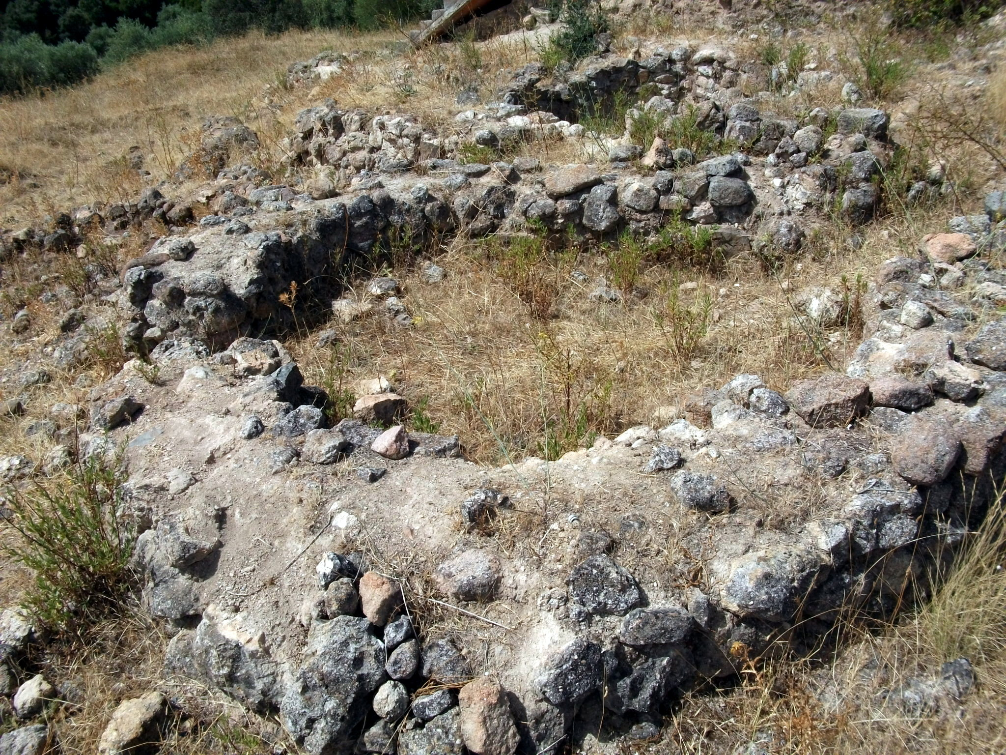 Monte da Tumba, no Torrão, Alcácer do Sal, Portugal.